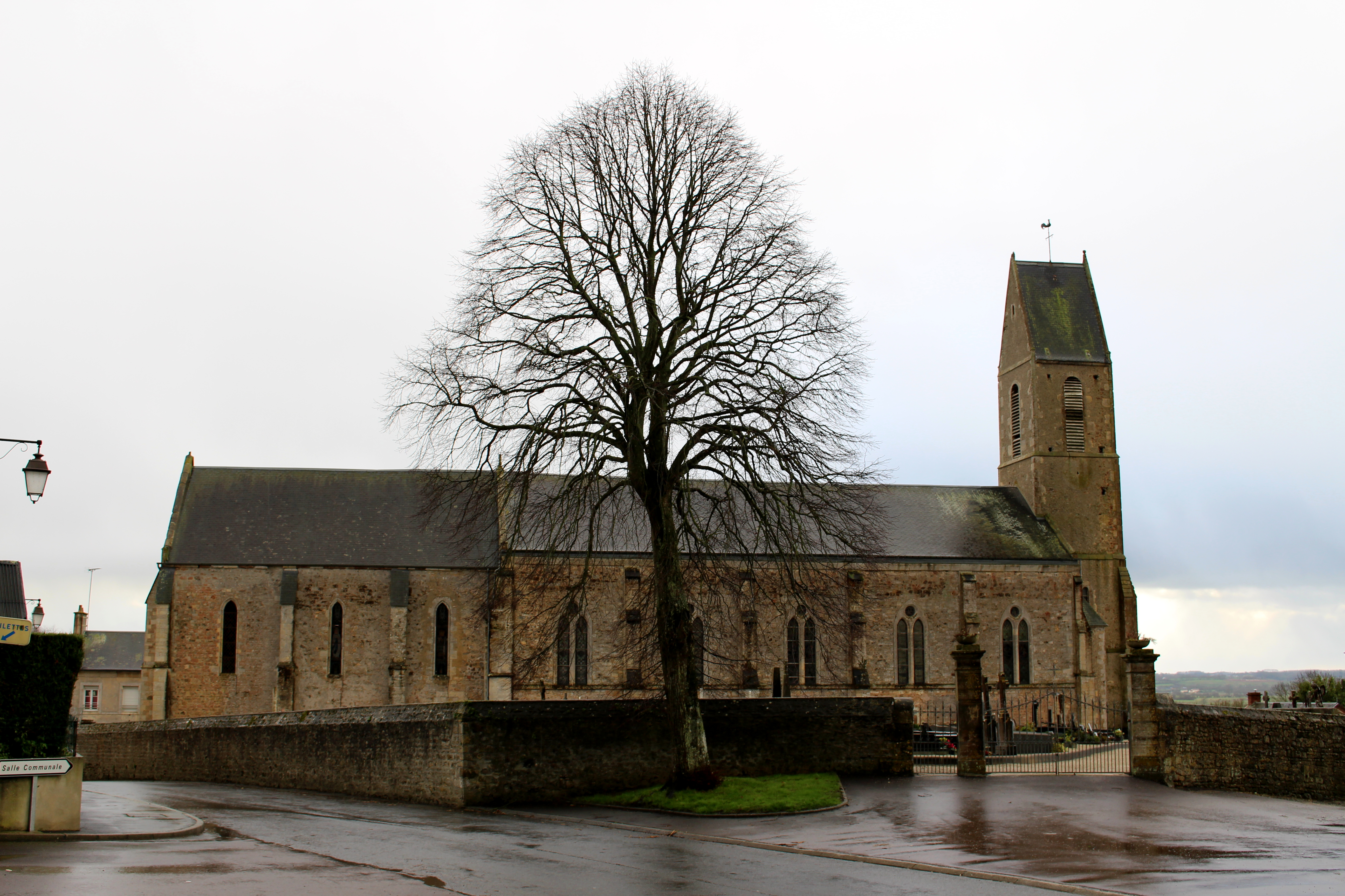 Neuilly-la-Forêt, Calvados